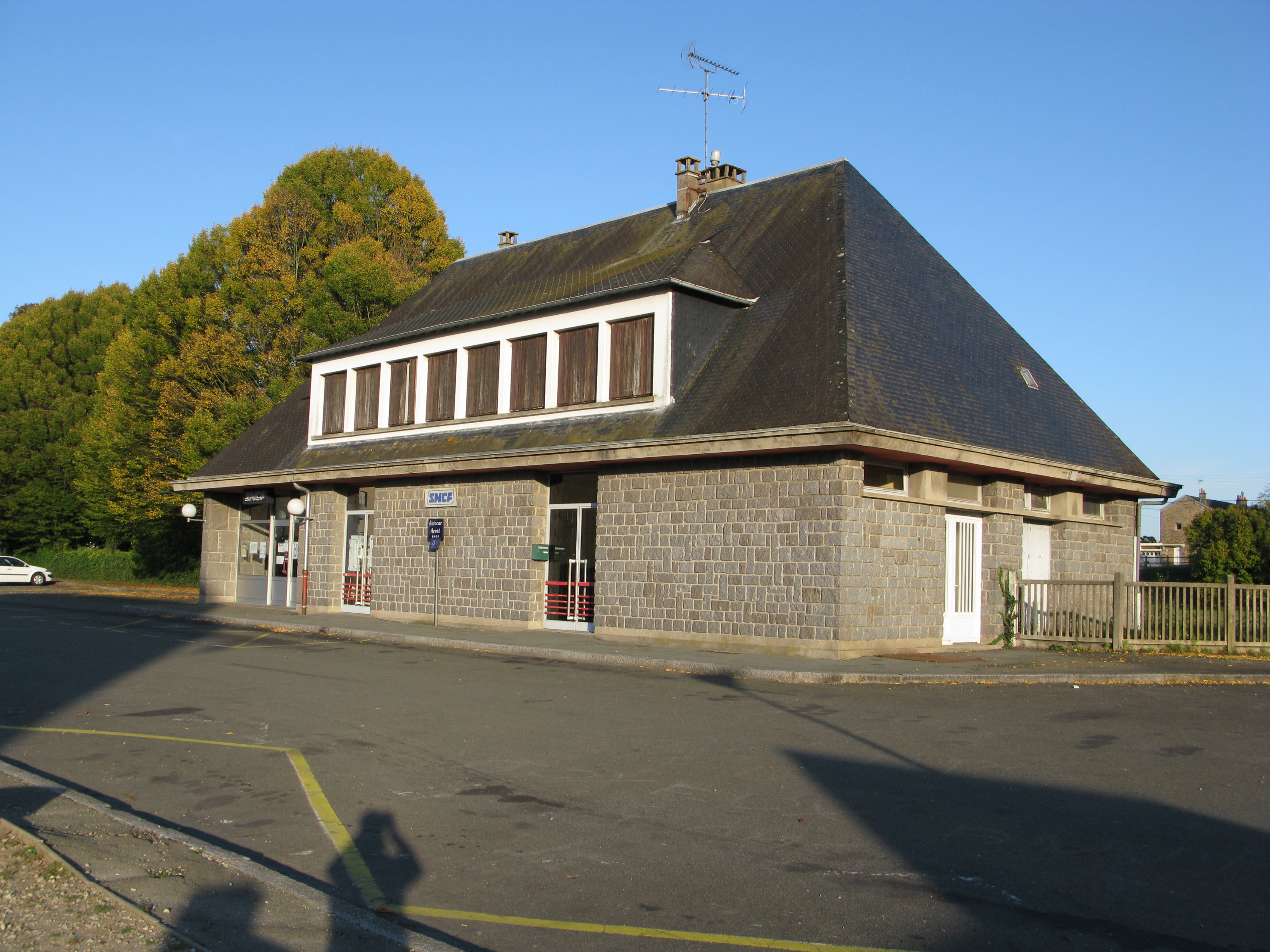 La gare de Mayenne en octobre 2011.